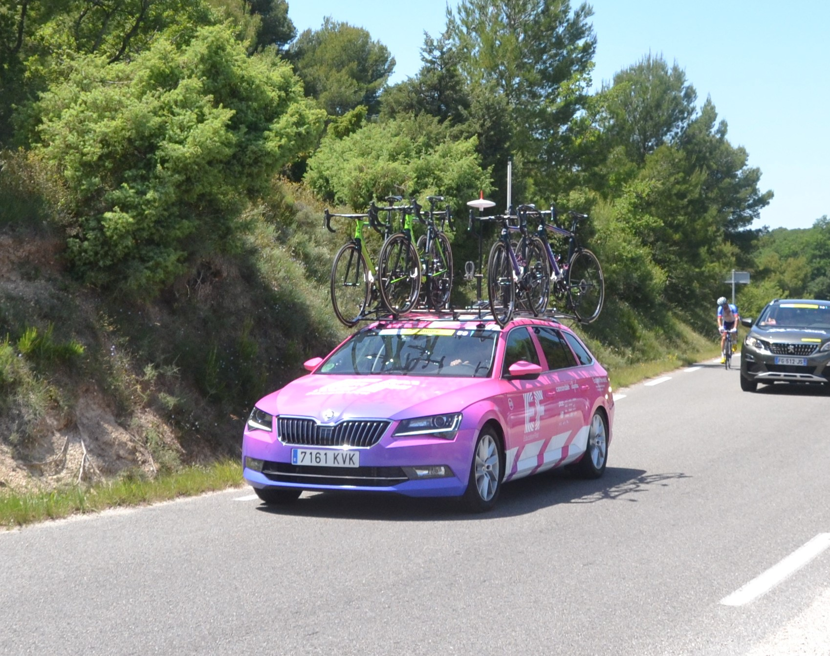 Mont Ventoux Dénivelé Challenges 2019 à Blauvac